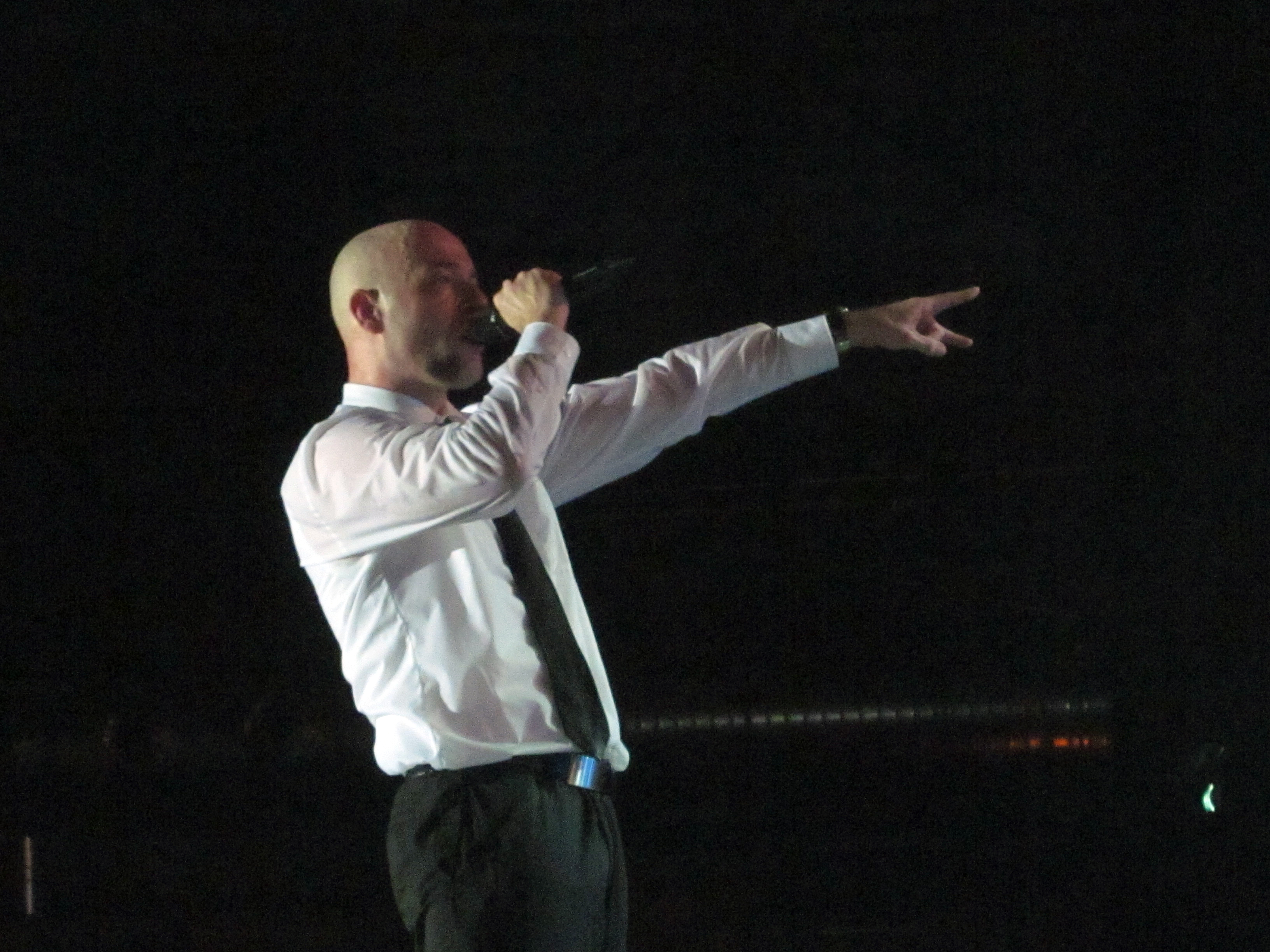 Unheilig - 10 Jahre Tour - Der Graf